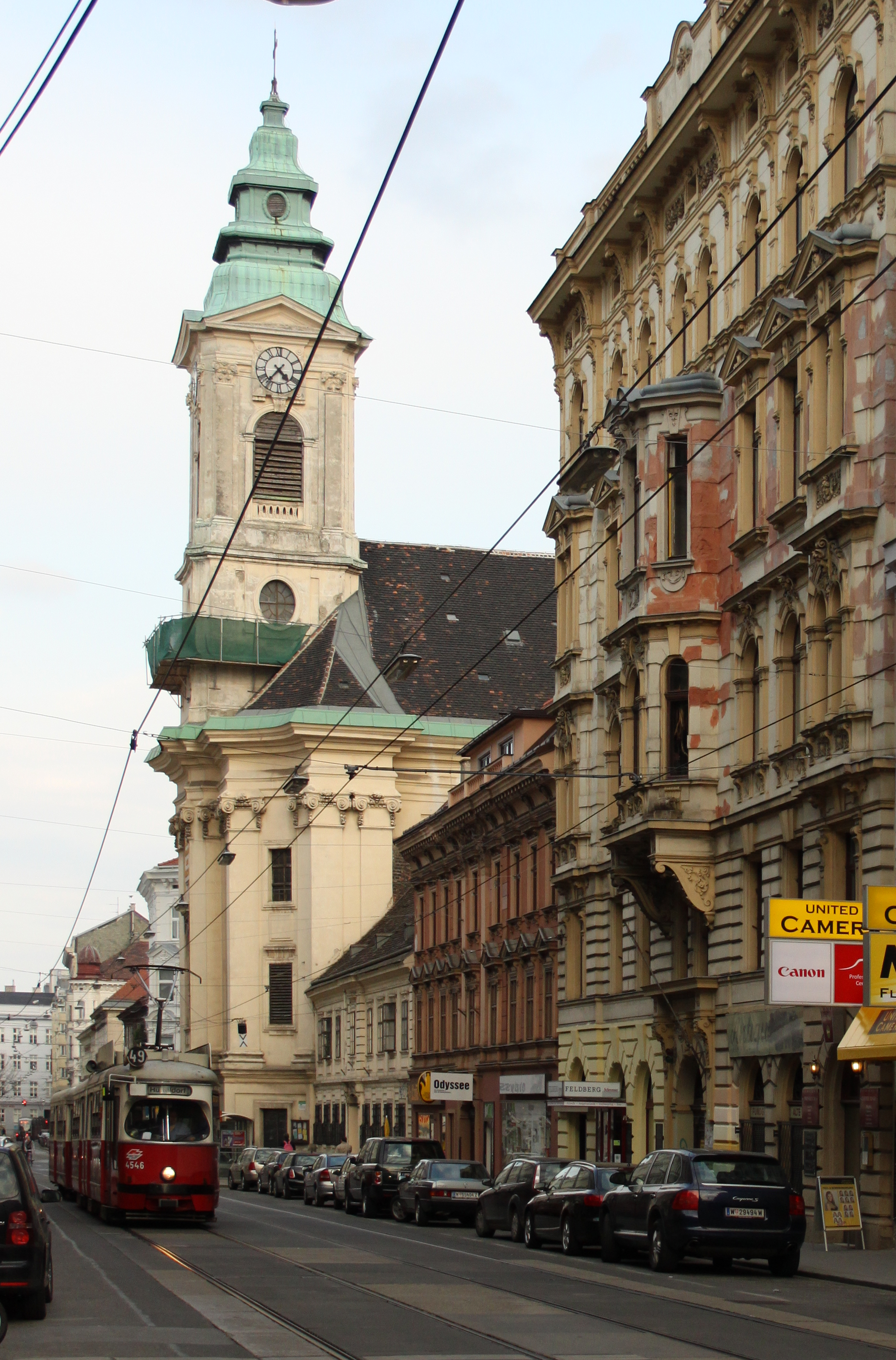 Kath. Pfarrkirche, Schottenfelderkirche, Pfarrkirche hl. Laurentius